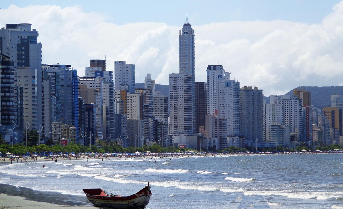 Millennium Palace, visto do canto direito da praia de Balneário Camboriú